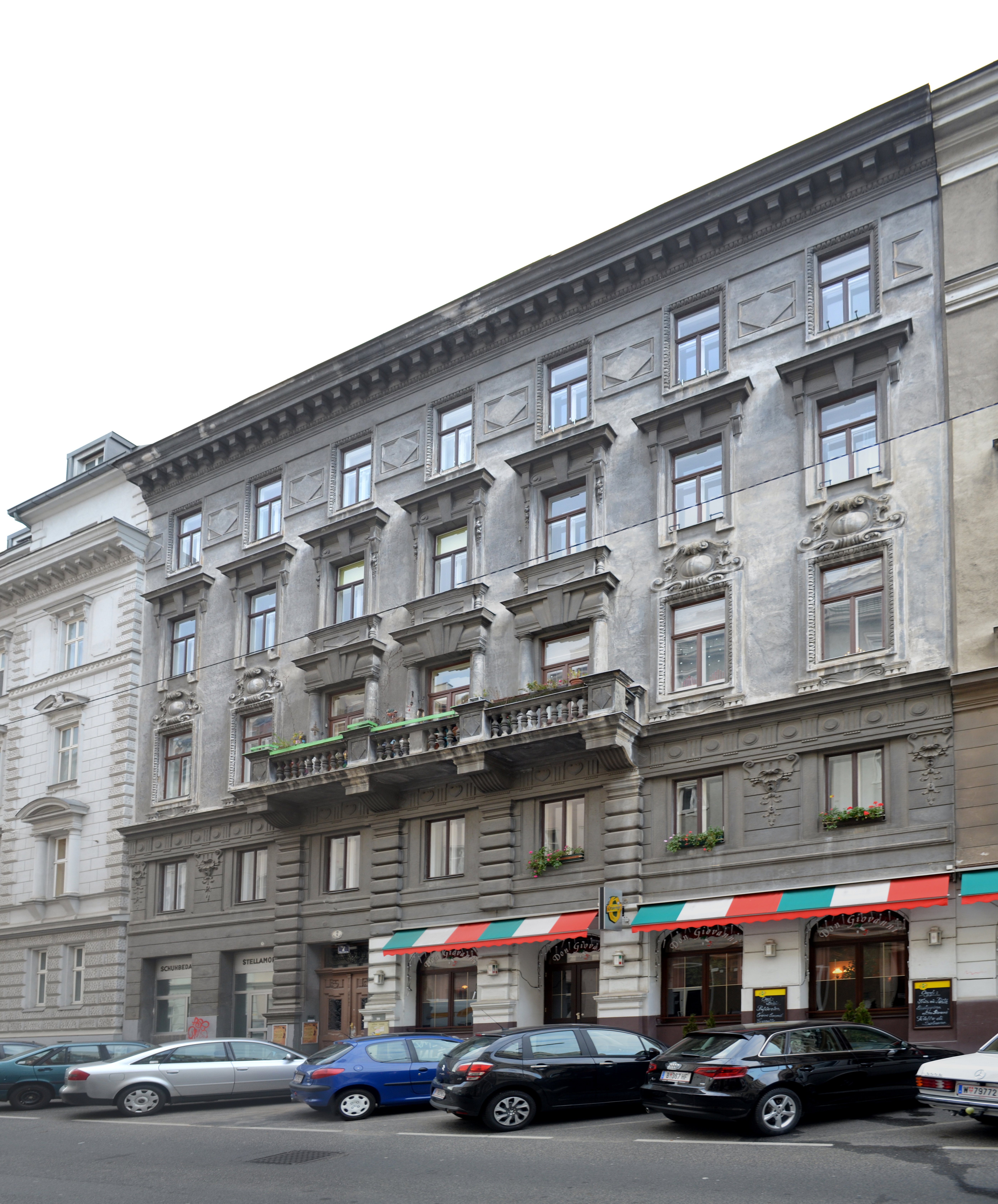 Wien, Weyringergasse 7